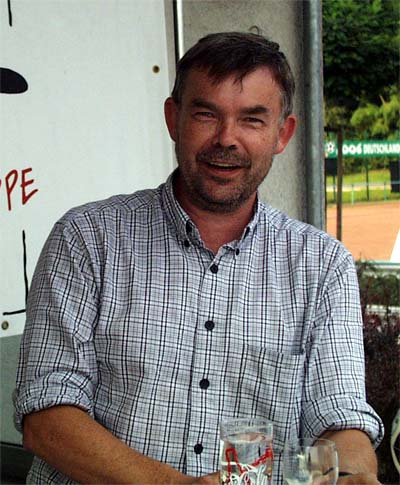 Photo von Manni Breukmann